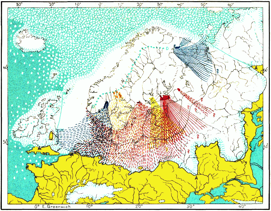 Карта переноса валунов из Скандинавии и Финдяндии